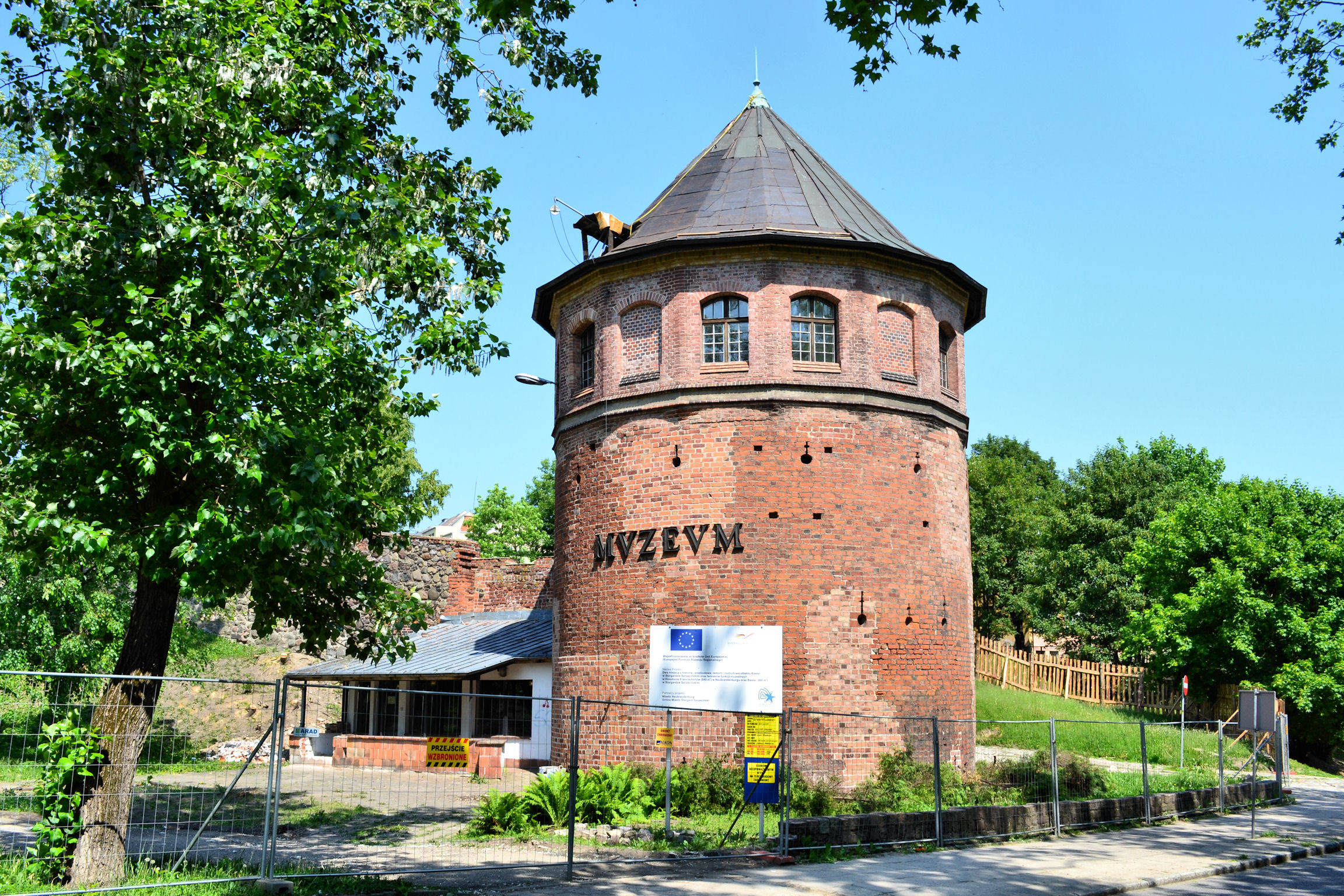 Basteja w Stargardzie Szczecińskim